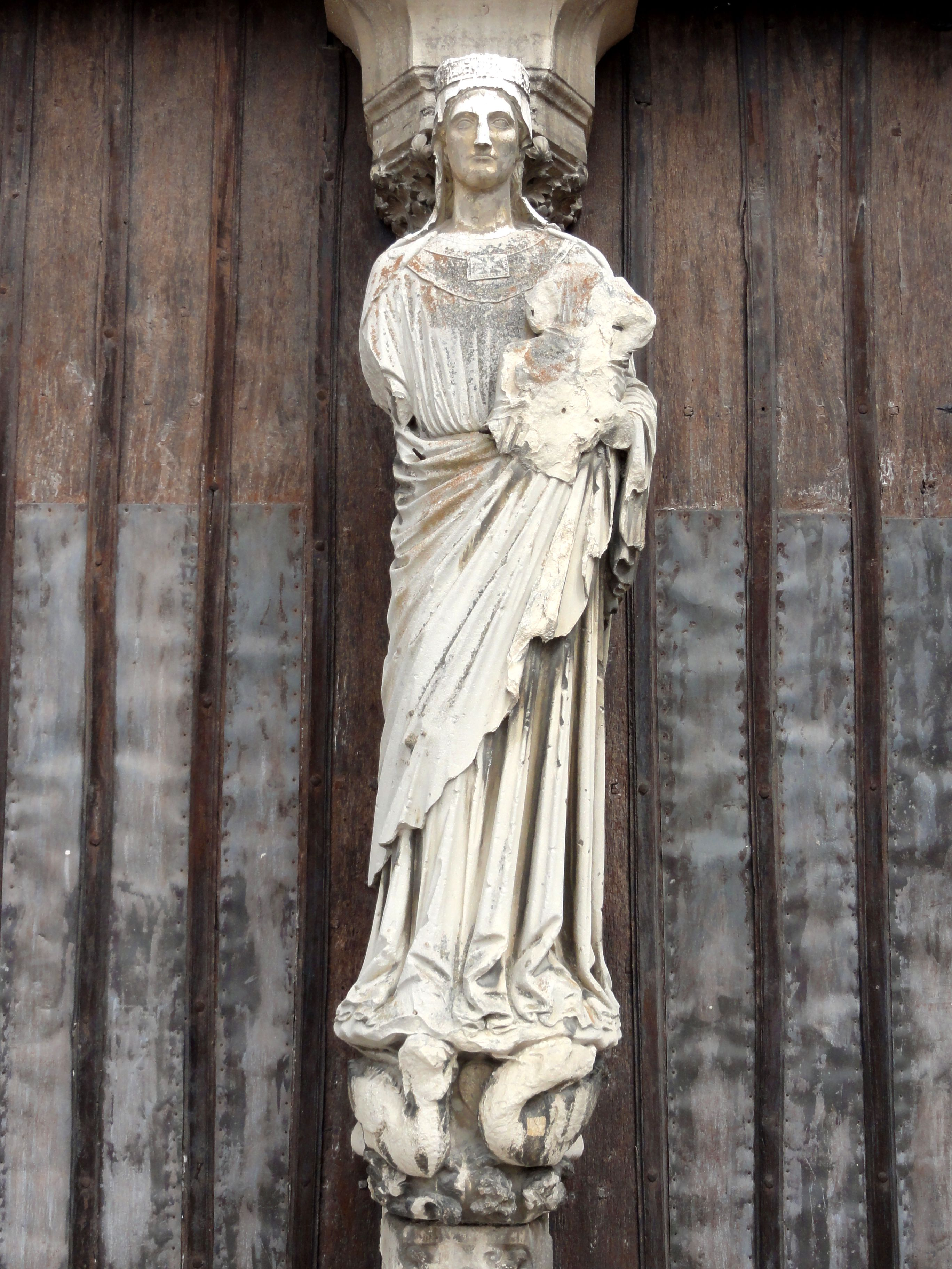 Statue du trumeau.